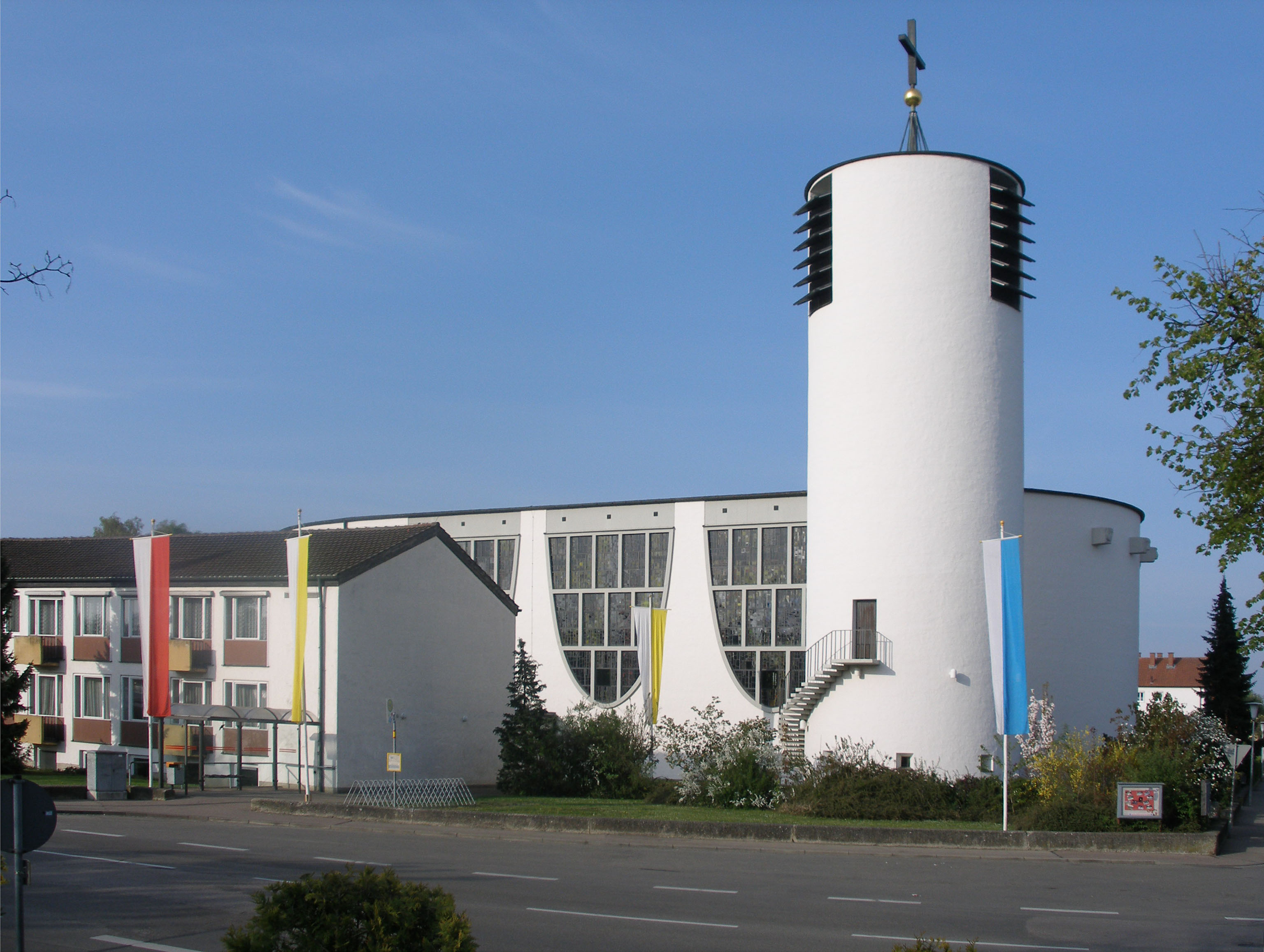 Frontansicht der Katholischen Pfarrkirche St. Josef Nördlingen